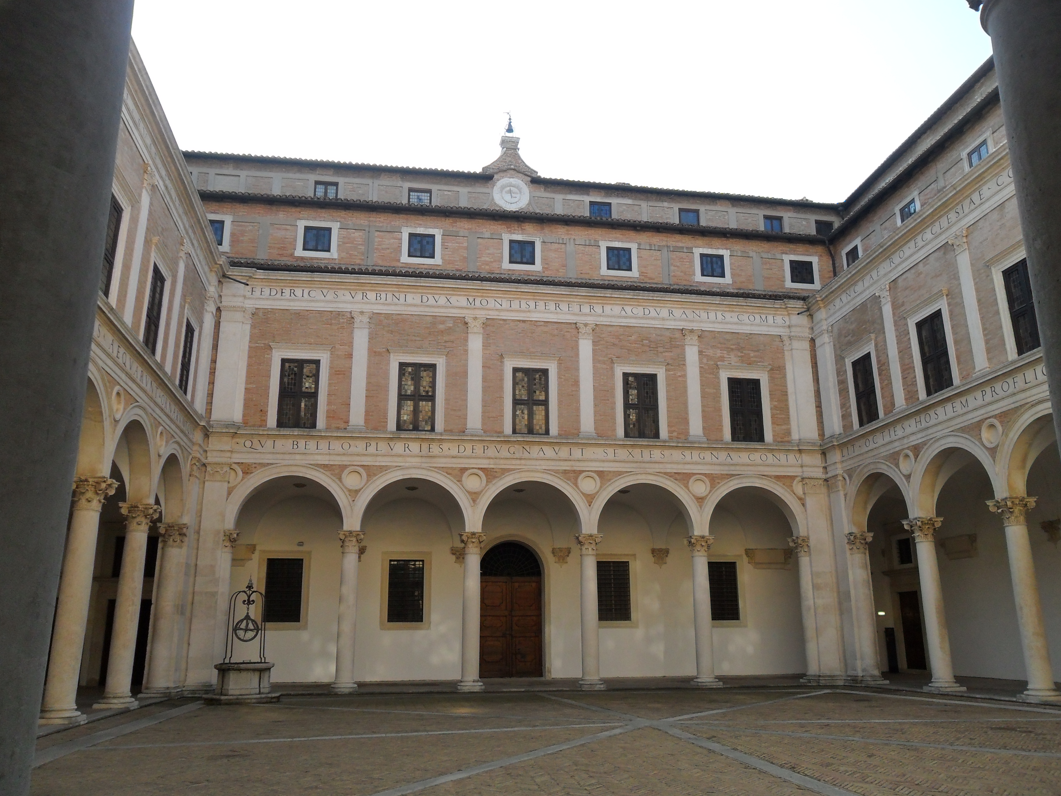 Urbino 01 018